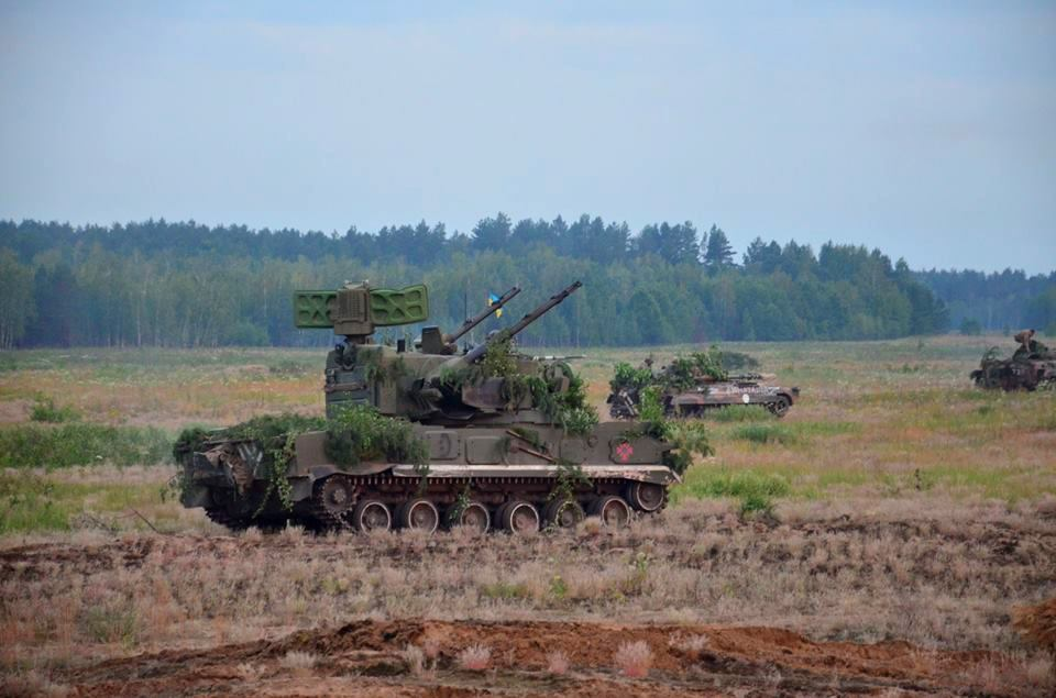 На військовому полігоні 1-ї окремої гвардійської танкової бригади (смт Гончарівське Чернігівської області) тривають десятиденні навчальні збори резервістів. Начальник Генерального штабу — Головнокомандувач Збройних Сил України генерал армії України Віктор Муженко перевірив хід проведення зборів з резервістами. Серед військовозобов’язаних є чимало бійців, які проходили військову службу в складі 1-ї окремої гвардійської танкової бригади у різні хвилі мобілізації, є учасниками АТО. Згідно плану зборів, навчання для військовослужбовців та резервістів продовжились із розроблення “плану бойових дій” бригади, прийняття рішень та доведення завдань до підрозділів. Зранку один із артилерійських дивізіонів продовжив перший навчальний етап виконанням вогневого завдання бойовими пострілами. Також для виконання практичних вправ стрільб зі стрілецької зброї, згідно плану, було задіяно військовослужбовців одного з танкових батальйонів. Підрозділи на першому етапі навчальних зборів відпрацювали елемент переміщення у вихідний район для “наступу” та знаходяться в місцях відповідно до своїх напрямків виконання завдань. Після проведення рекогносцировки, організації взаємодії, розпочалась практична робота командира в підпорядкованих підрозділах та організація контролю готовності. Фото: Роман Туровець